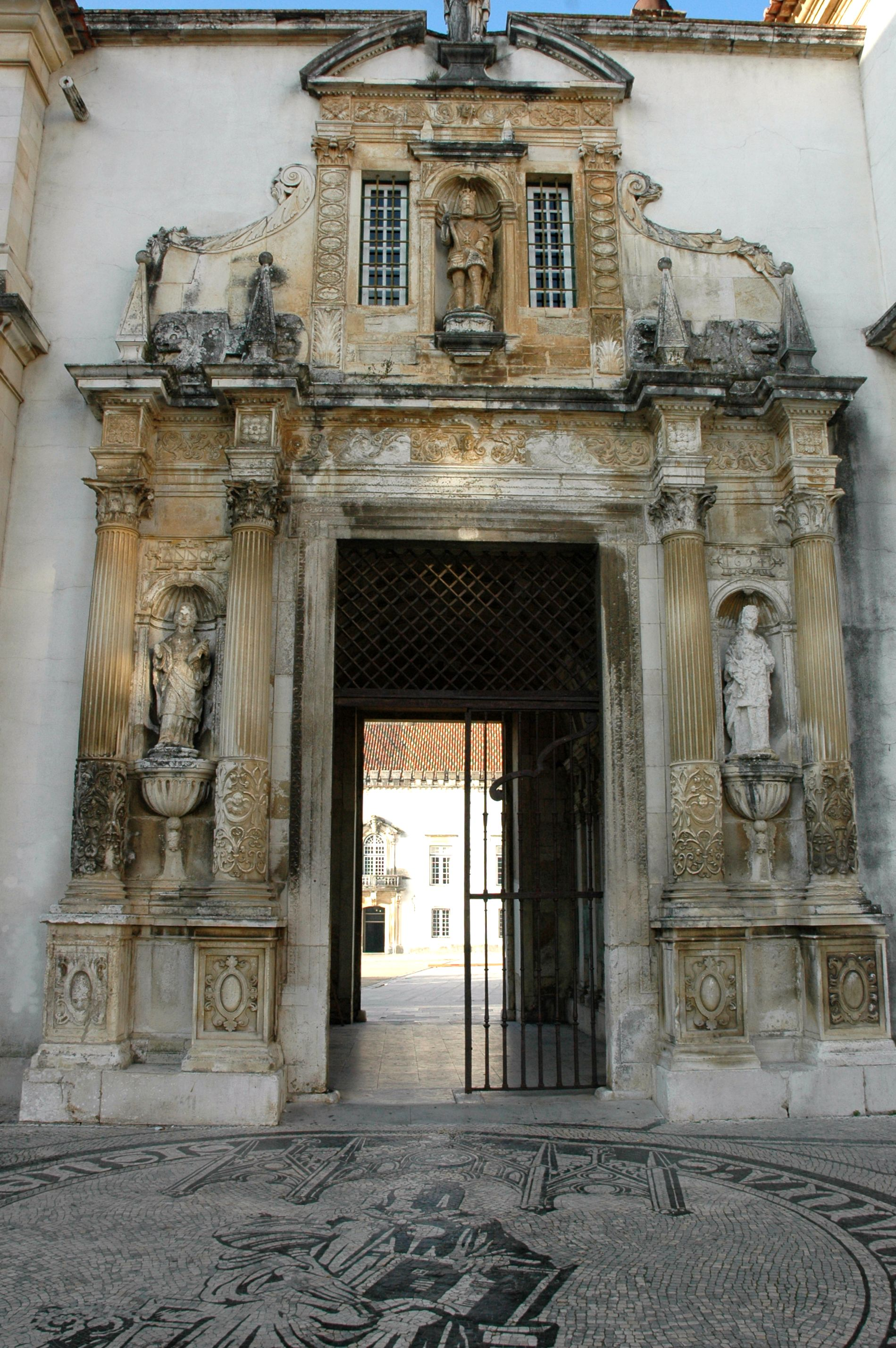 Universitat de Coïmbra - Porta ferrada